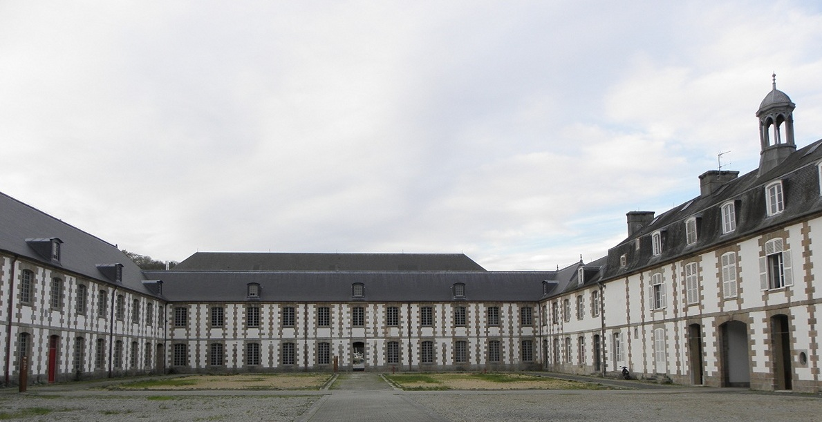 Façade septentrionale de la cour d'honneur de la Manufacture des tabacs de Morlaix (29).